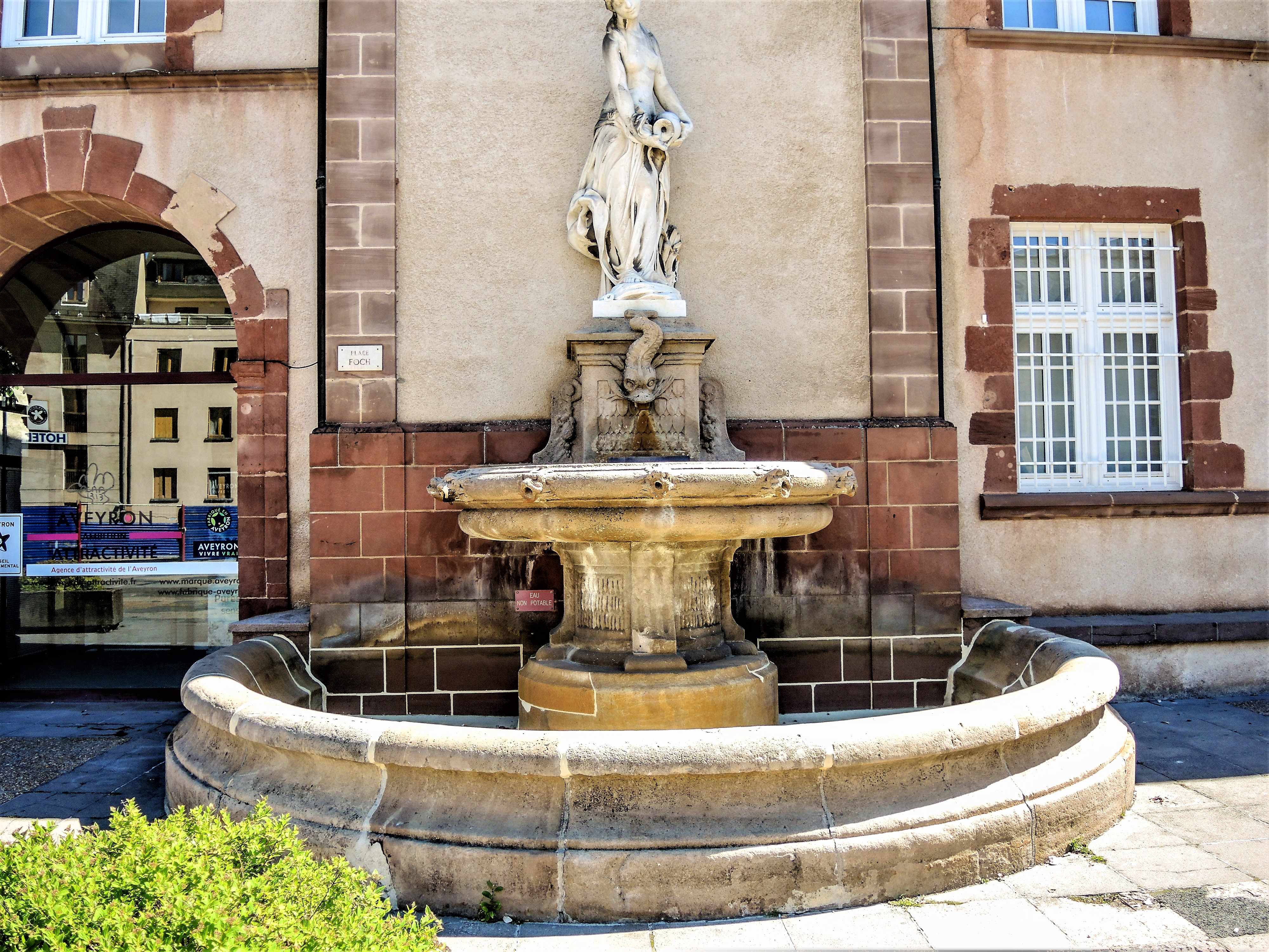 Fontaine